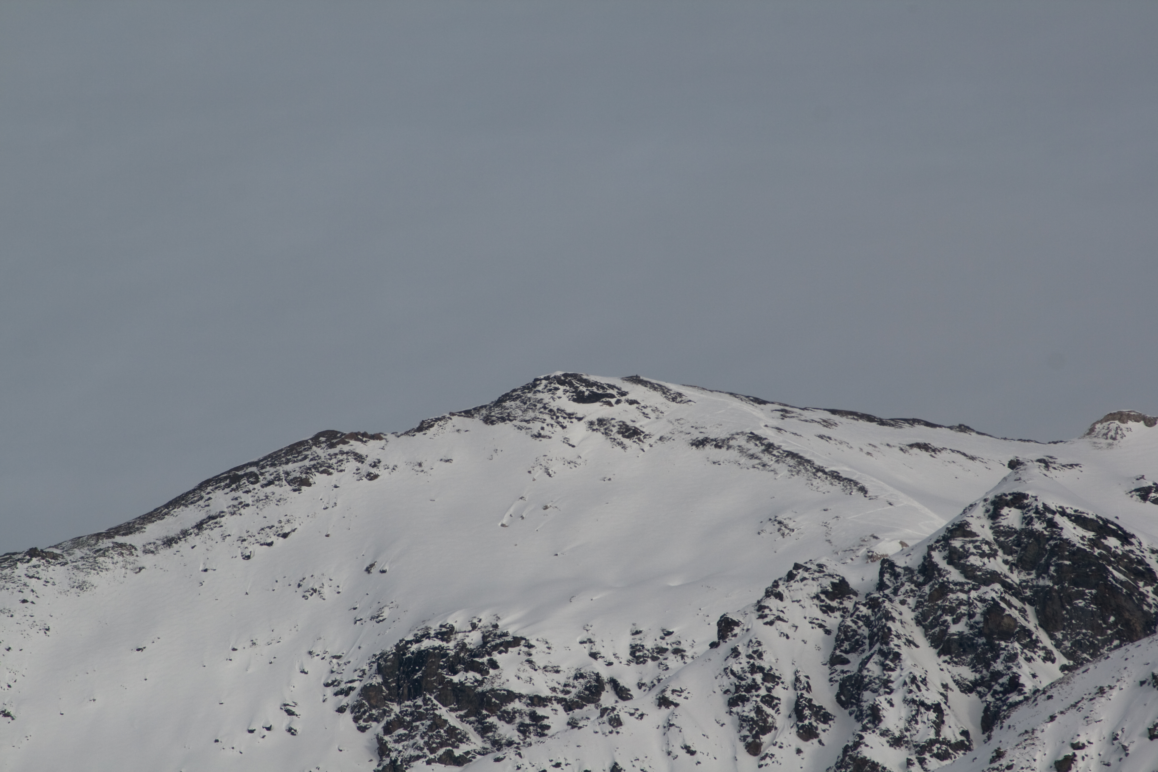 Le Frilihorn dans les Alpes valaisannes, vu depuis les pentes de la Corne de Sorebois.